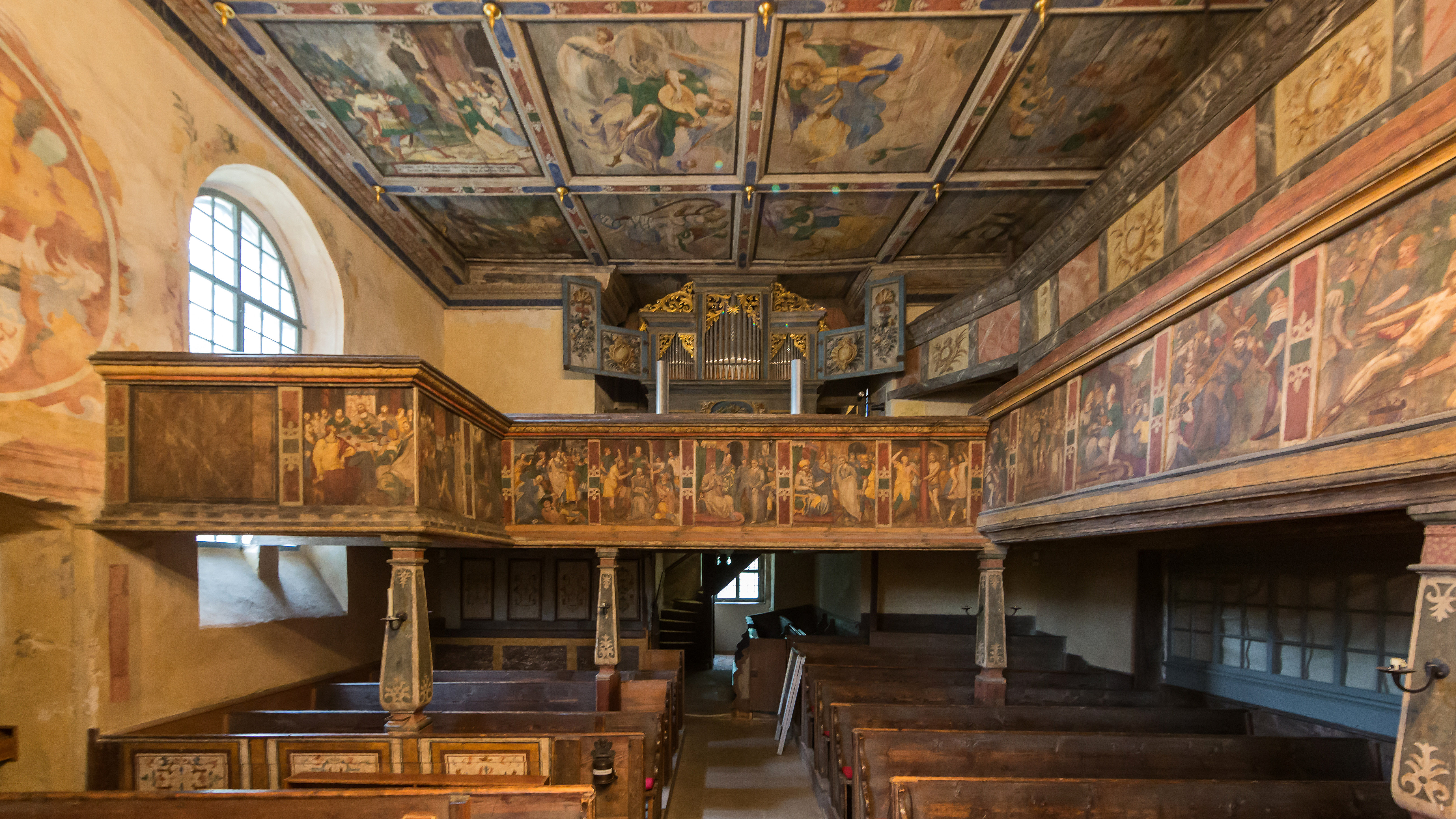 Coswig Ravensburger Platz Alte Kirche III